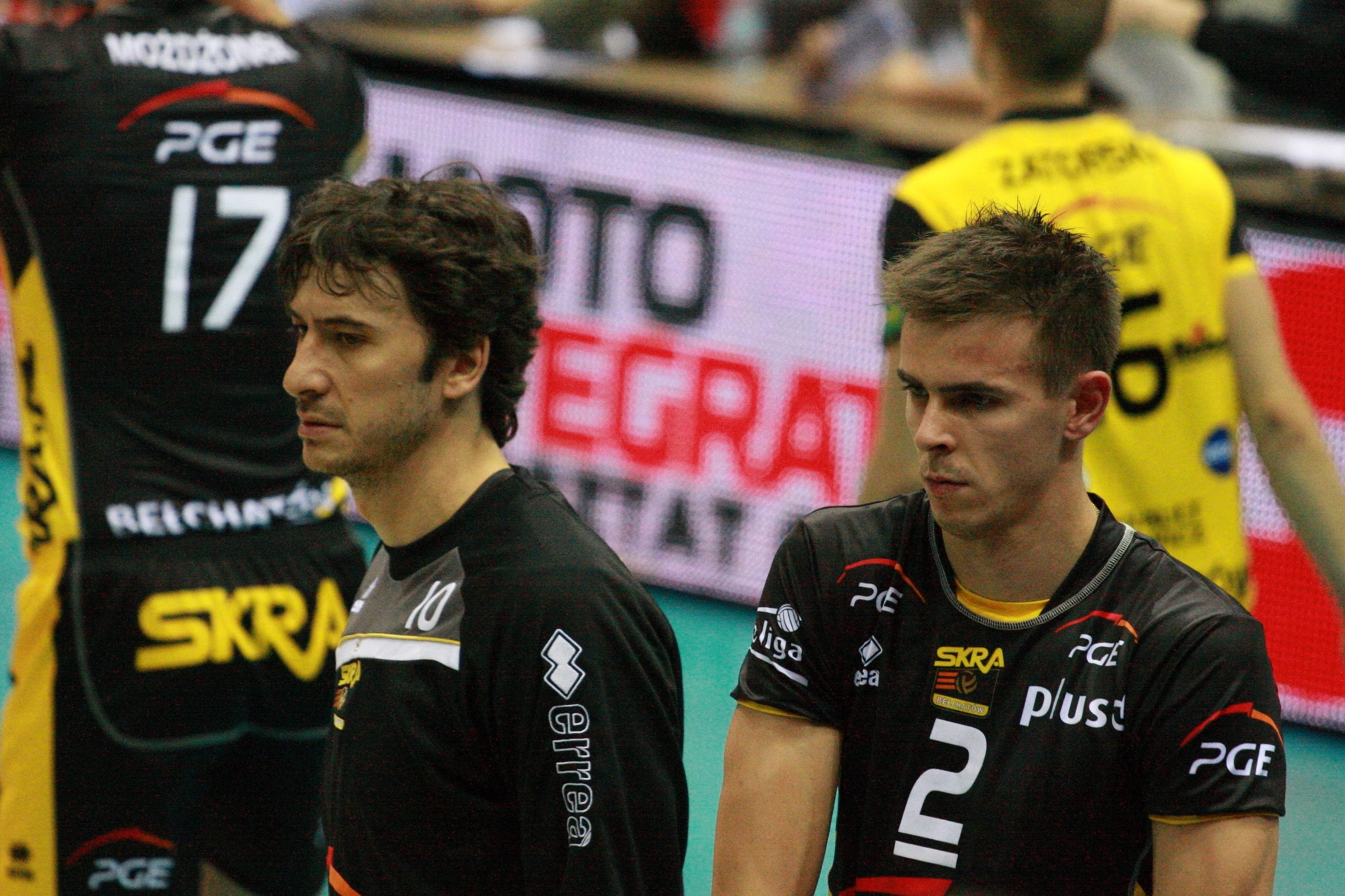 Lotos Gdańsk vs Skra Bełchatów